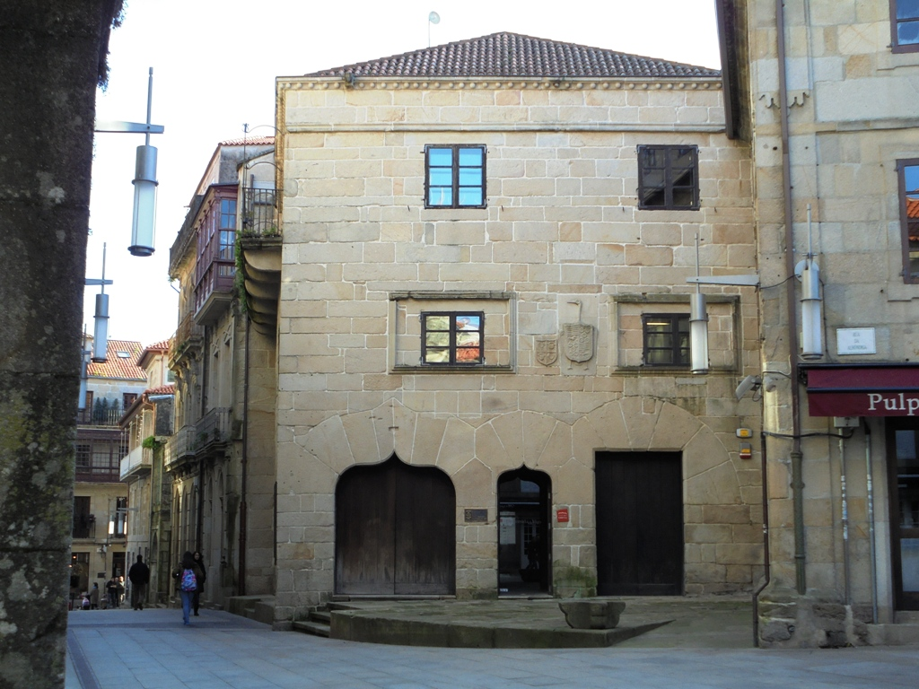 Casa de las Campanas en Pontevedra capital